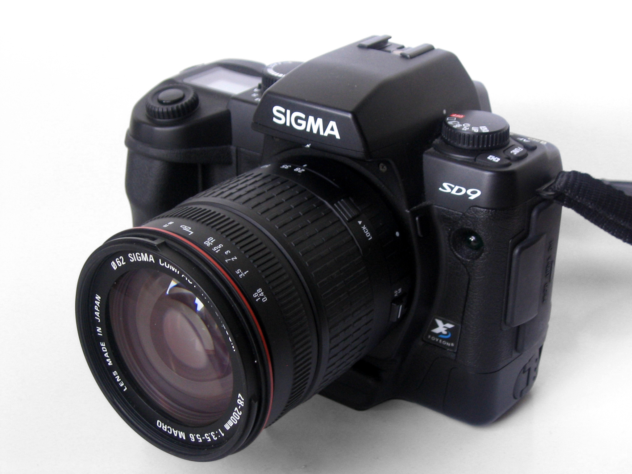 Taken by ed g2s • talk.